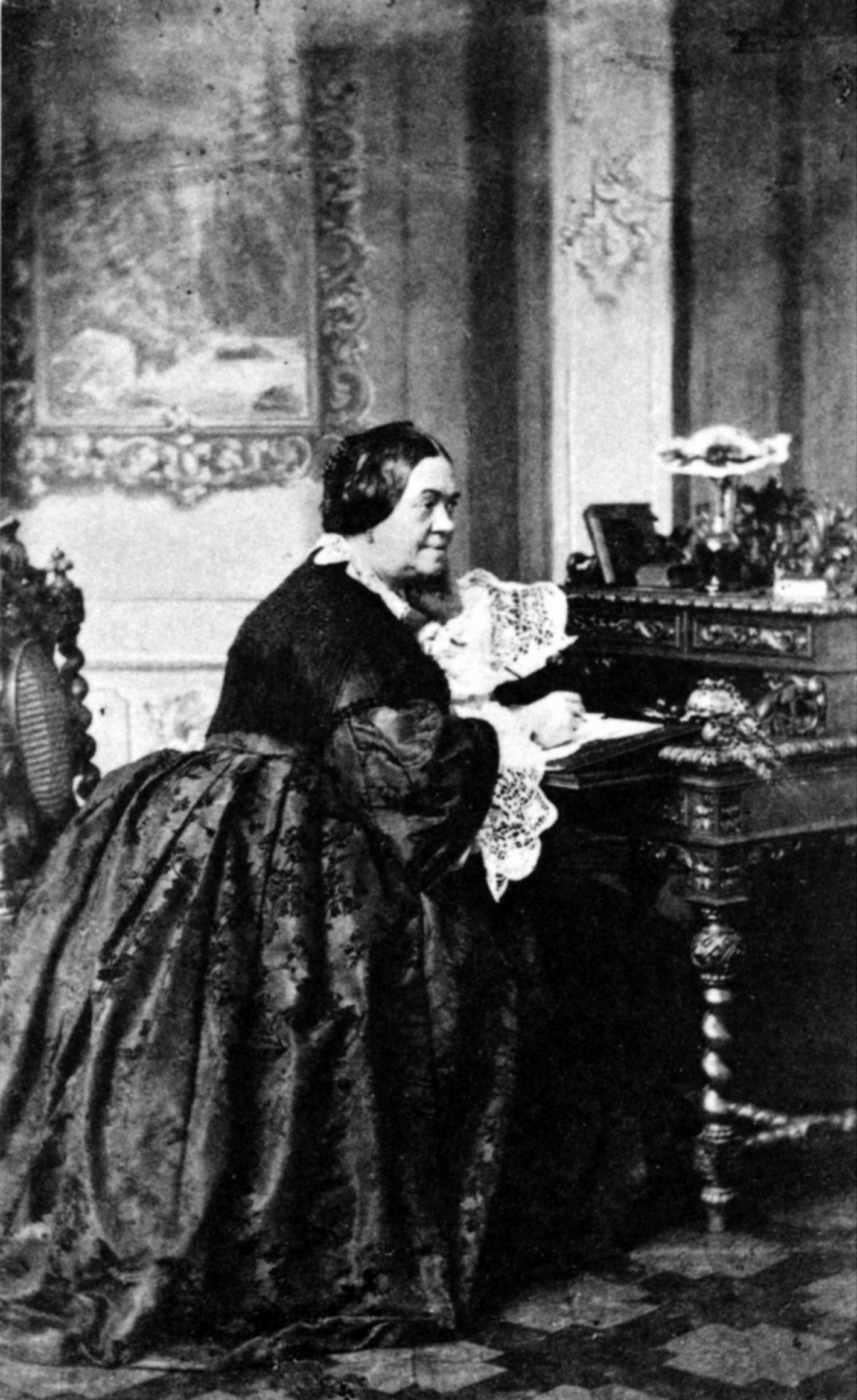 Charlotte Birch-Pfeiffer am Schreibtisch in ihrer Berliner Wohnung (Fotografie von Heinrich Graf,um 1850)